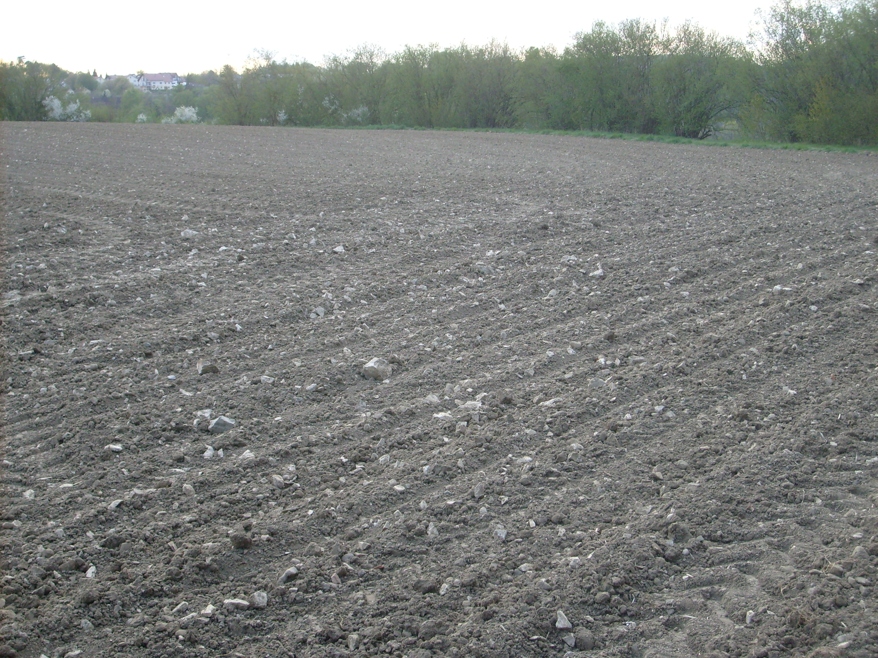 Römischer Gutshof von Inzigkofen, Zerstörungen im April 2009 durch intensive Landwirtschaft